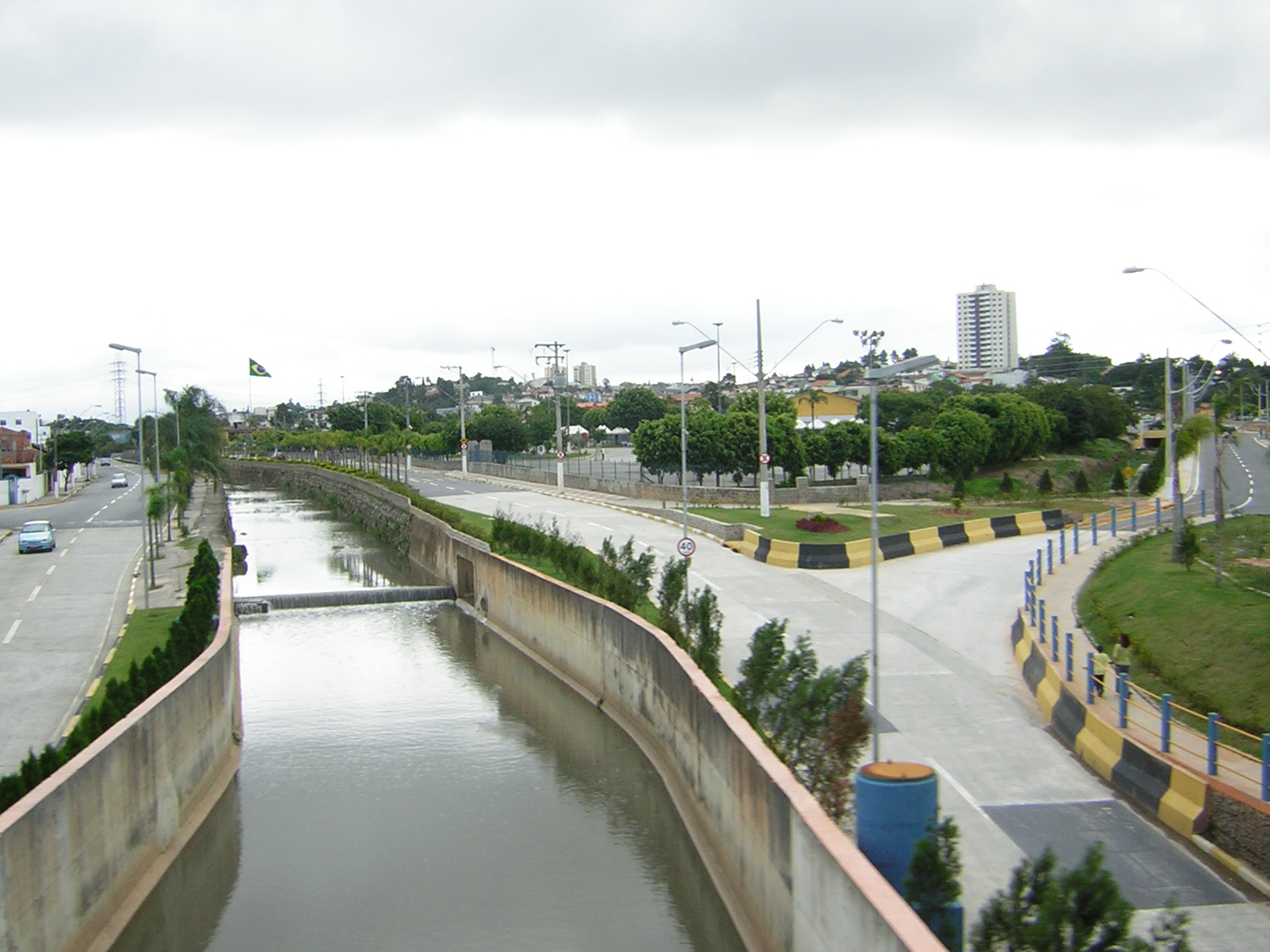 Córrego Itaim na cidade de Poá - SP.